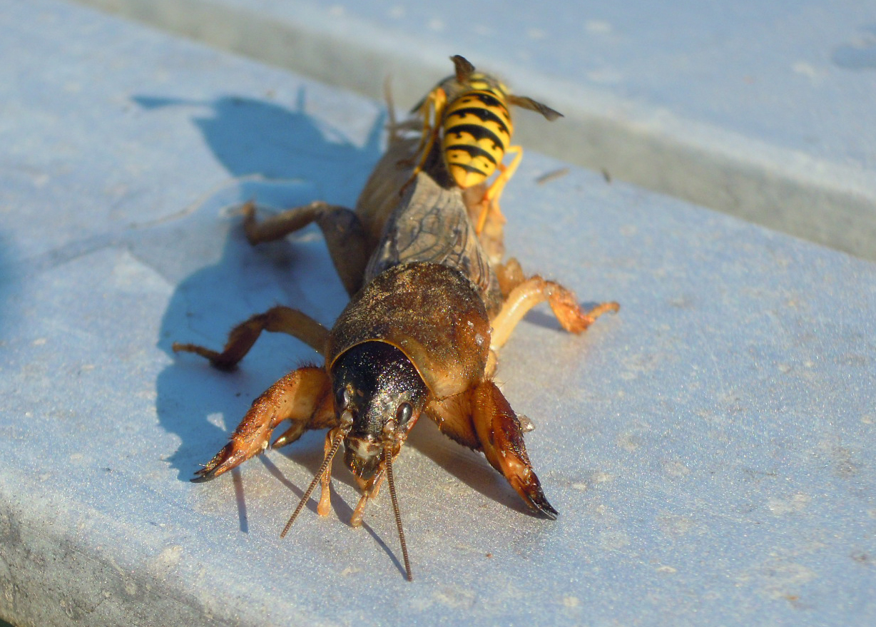 Avespa comendo nun grilo ceboleiro morto, en Pazos (Marcón, Pontevedra).